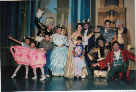 Georgina Pontaza en la obra de El Rey Leon y La Bella y la Bestia